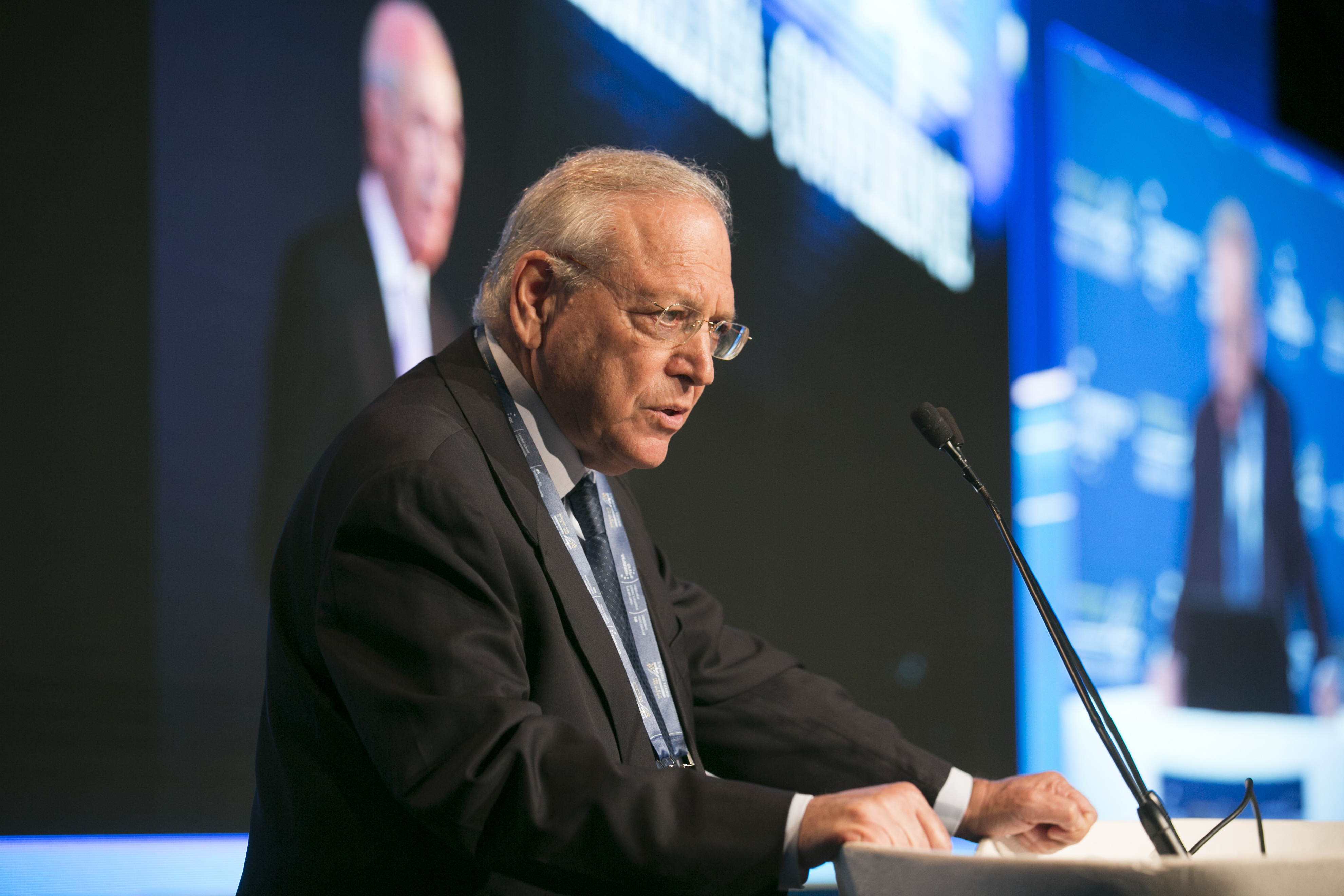 פרופ' אוריאל רייכמן, מייסדו ונשיאו של המרכז הבינתחומי, נואם בכנס הרצליה